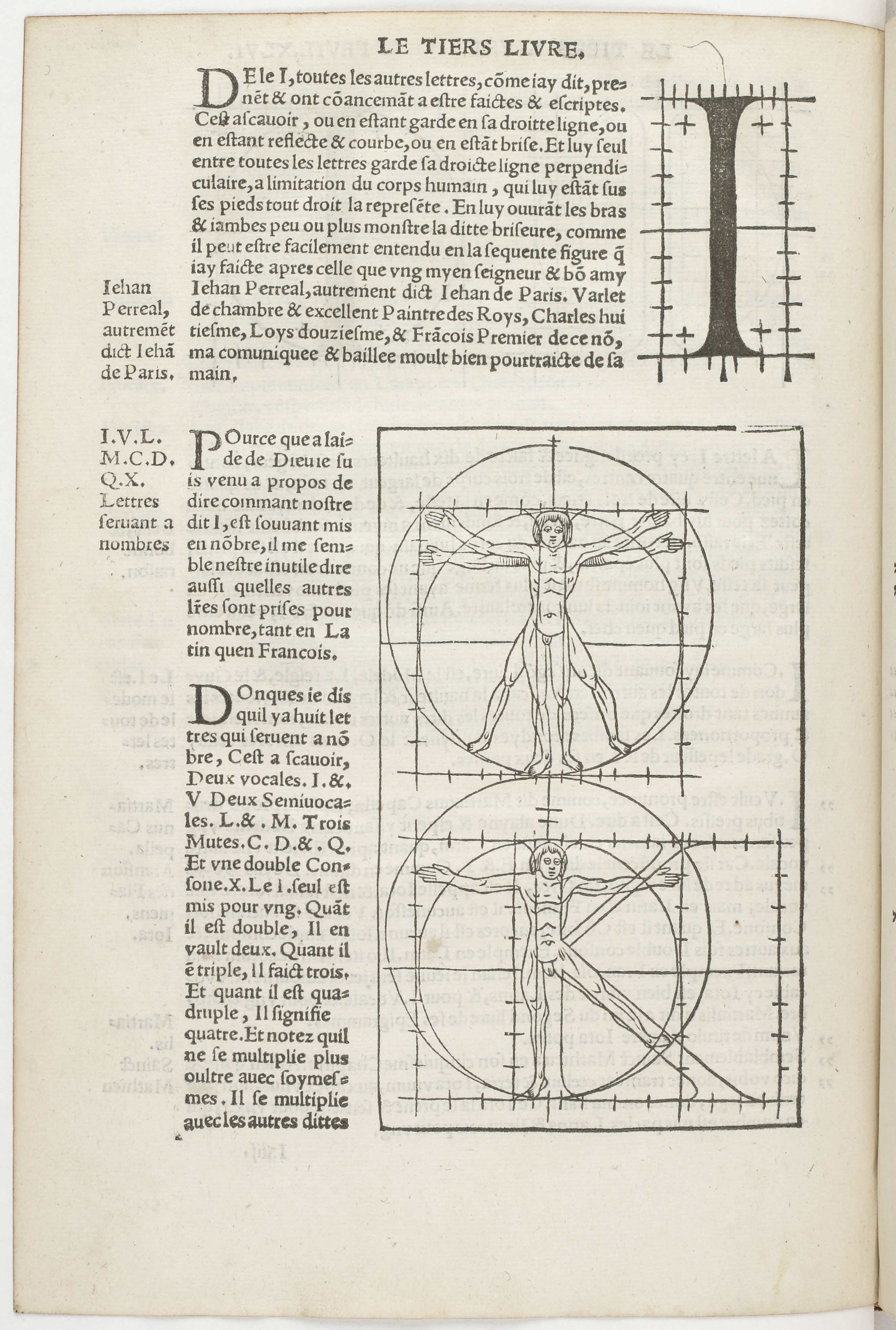 Page from Champ fleury, au quel est contenu lart et science de la deue et vraye proportion des lettres attiques, quon dit autrement lettres antiques et vulgairement lettres romaines, proportionnees selon le corps et visage humain ... par Maistre Geoffroy Tory ...